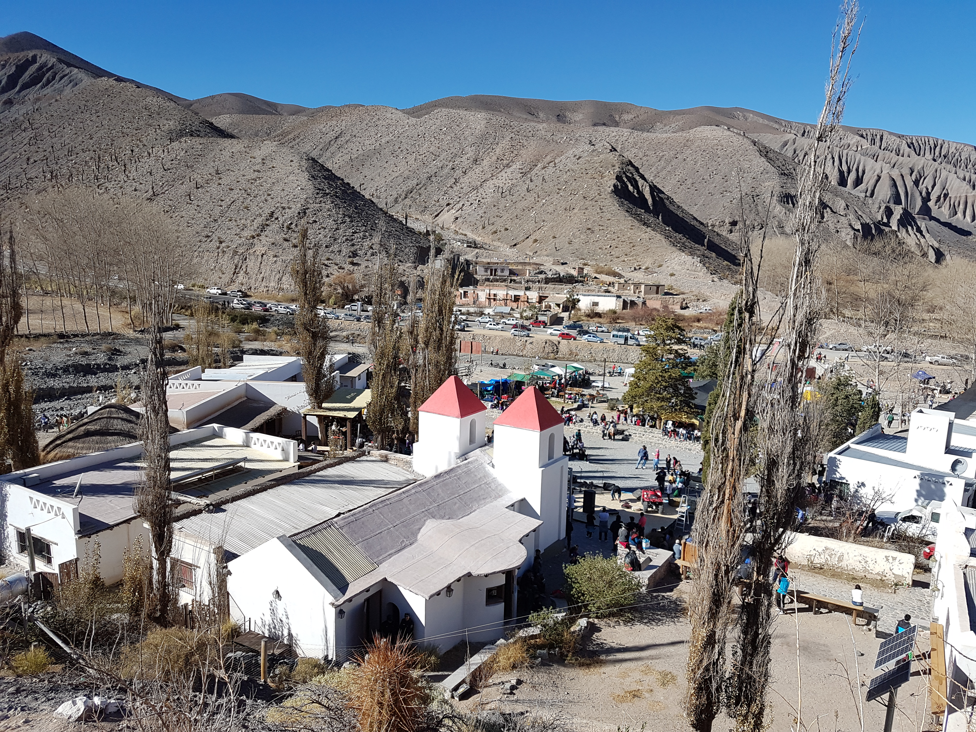 monumento cultural. lugares